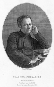 Retrato del óptico francés Charles Chevalier (1862)